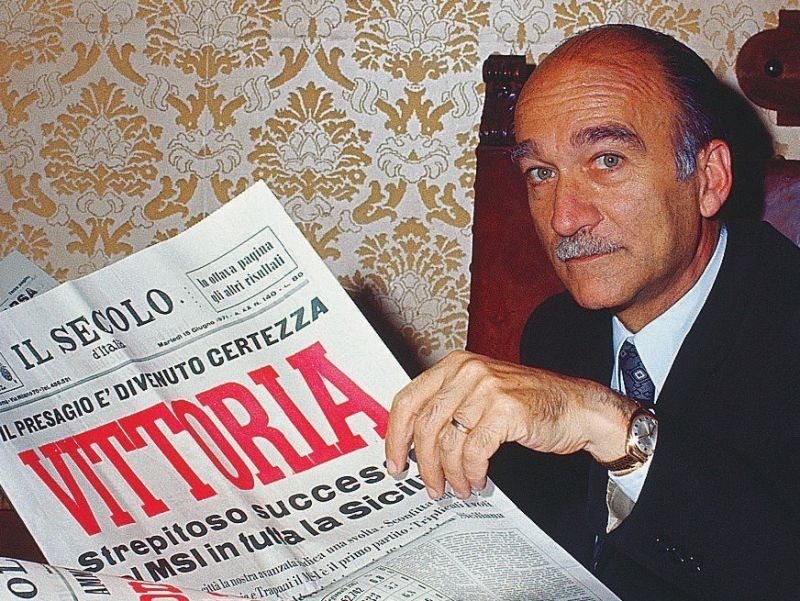 Giorgio Almirante con una copia de Il Secolo d'Italia che celebra la vittoria del Movimento Sociale Italiano alle elezioni regionali in Sicilia del 1971